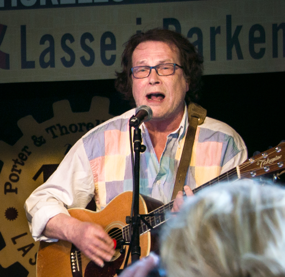 Mikael Ramel under utdelningen av KaRAMELodiktstipendiet 2017.